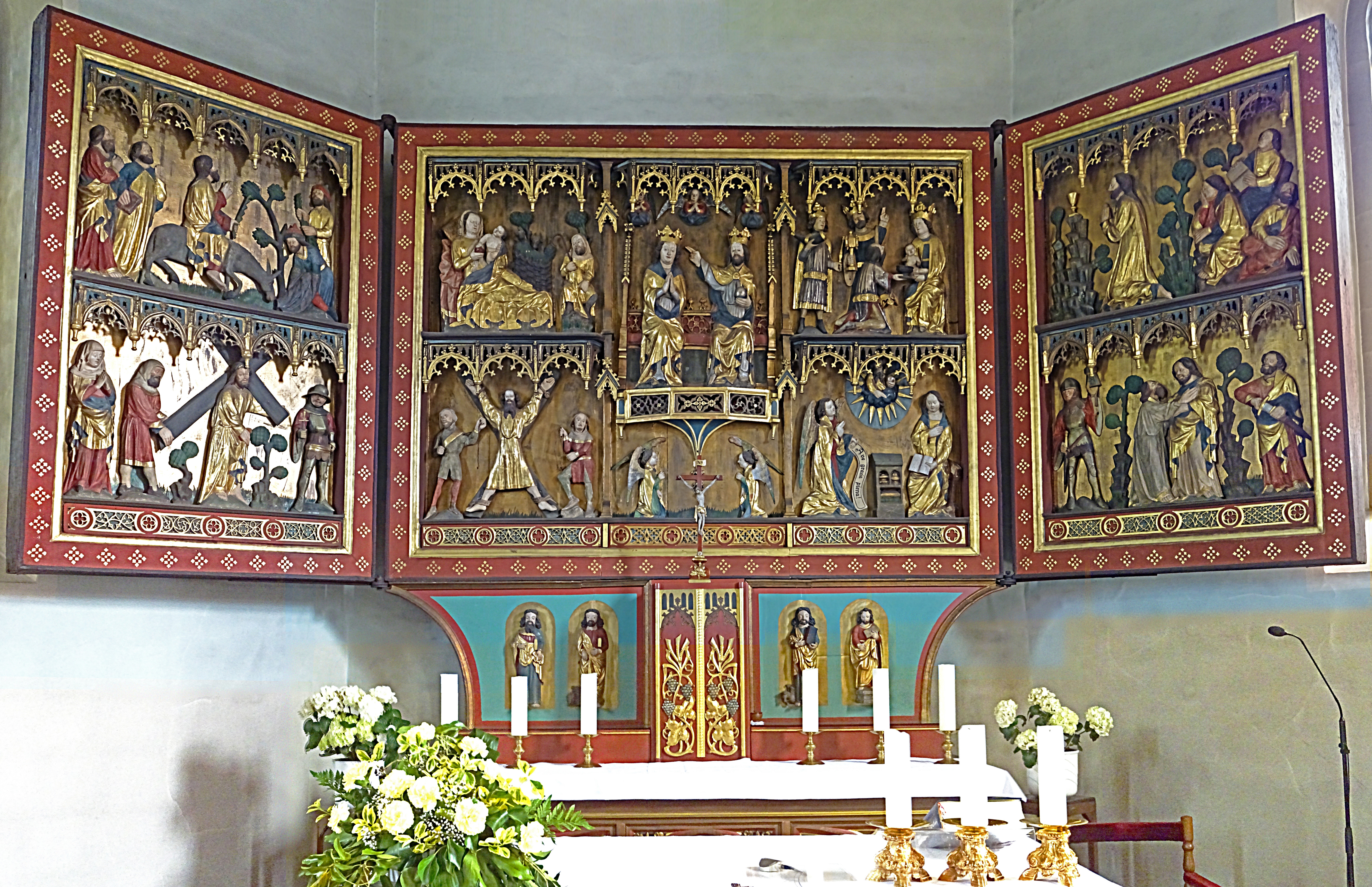 Andreasaltar in der Nikolauskirche (Neuendorf), ein gotischer Flügelaltar, vermutlich 1400 ... 1420 von Erfurter Meistern geschaffen und wohl ursprünglich aus der Andreaskirche in Erfurt